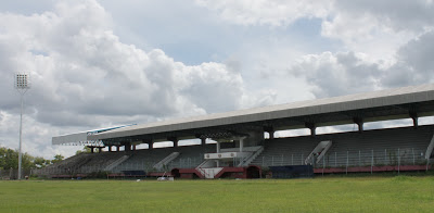 Gambar, karya sendiri